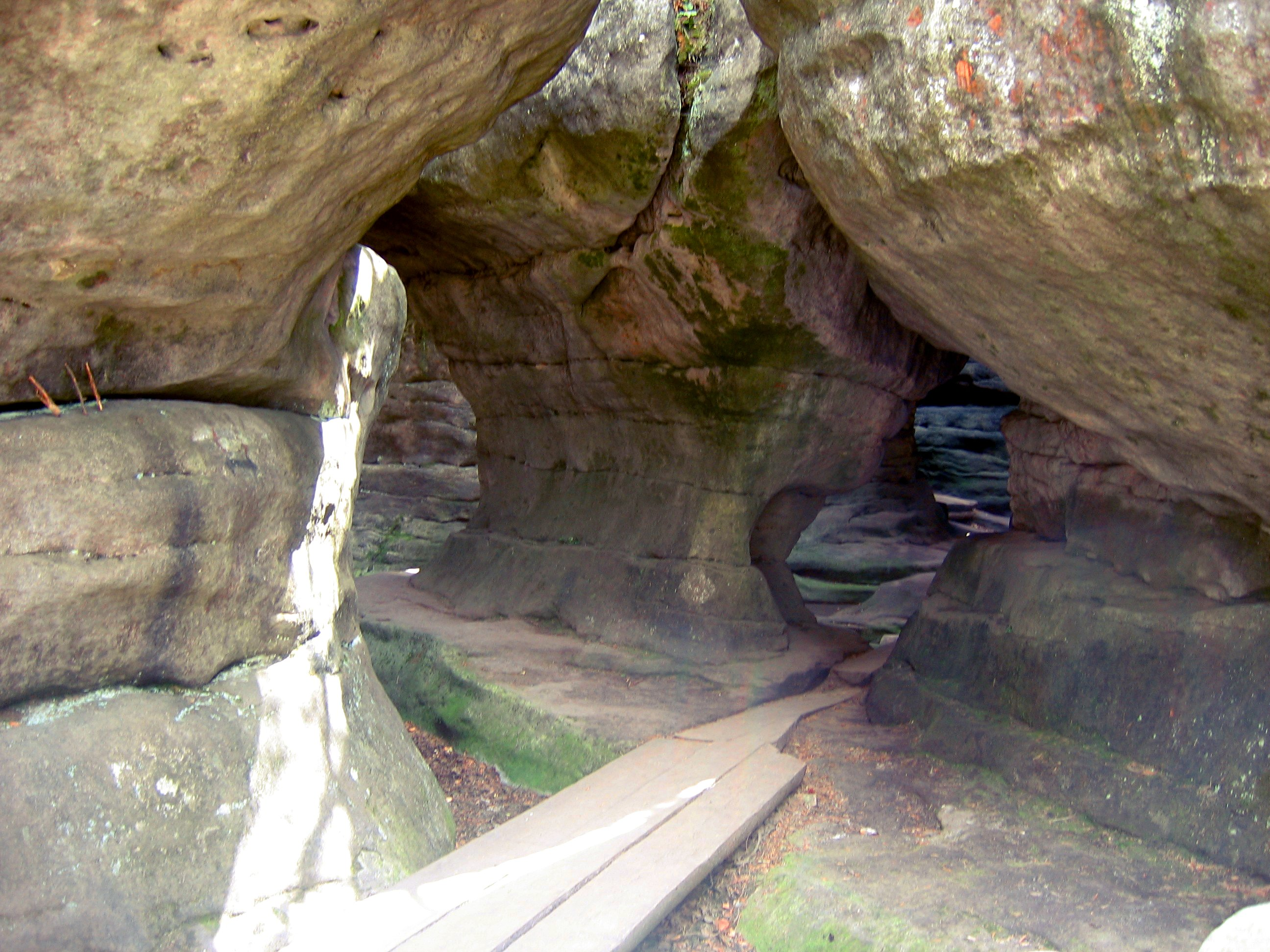 Błędne Skały (Góry Stołowe) - korytarze form skalnych